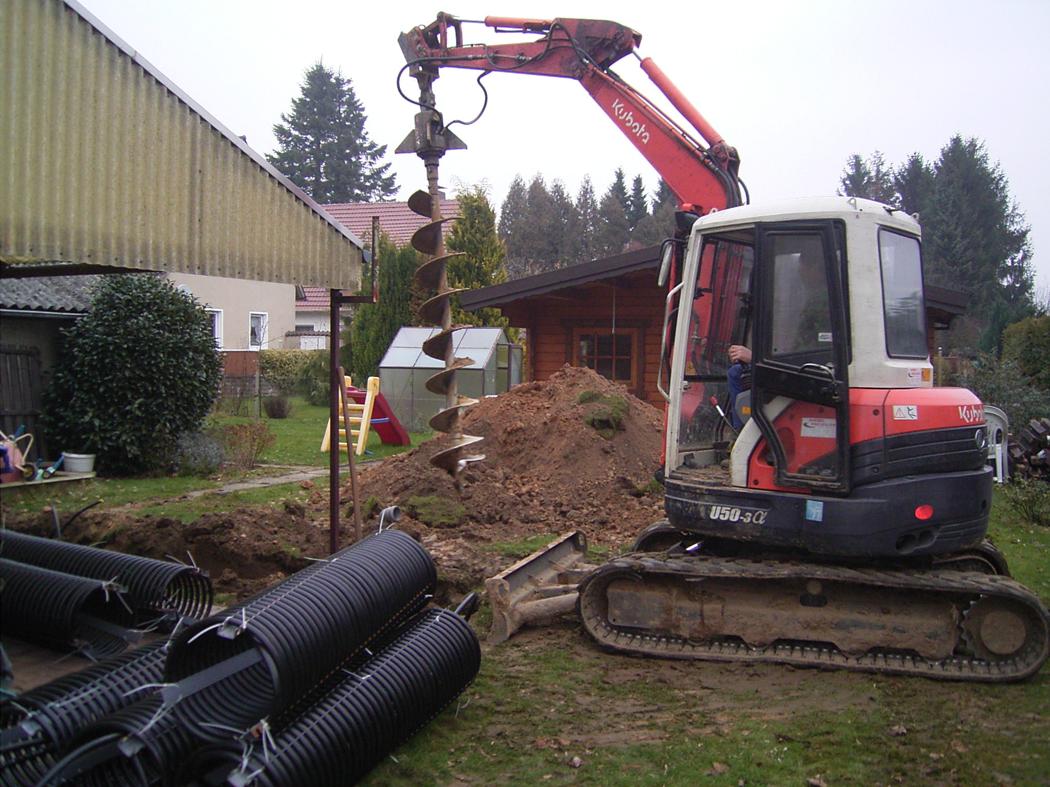 Spiralkollektoren für die Erdwärmeheizung, ca. 2 m hoch und 50 cm Durchmesser, diese werden senkrecht im Abstand von 2 m in den Erdboden verbracht, die Oberkante der Kollektoren liegt dann 1,5 m unter der Erdoberfläche.